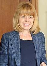 Представяне на доклада "София - град за хората"